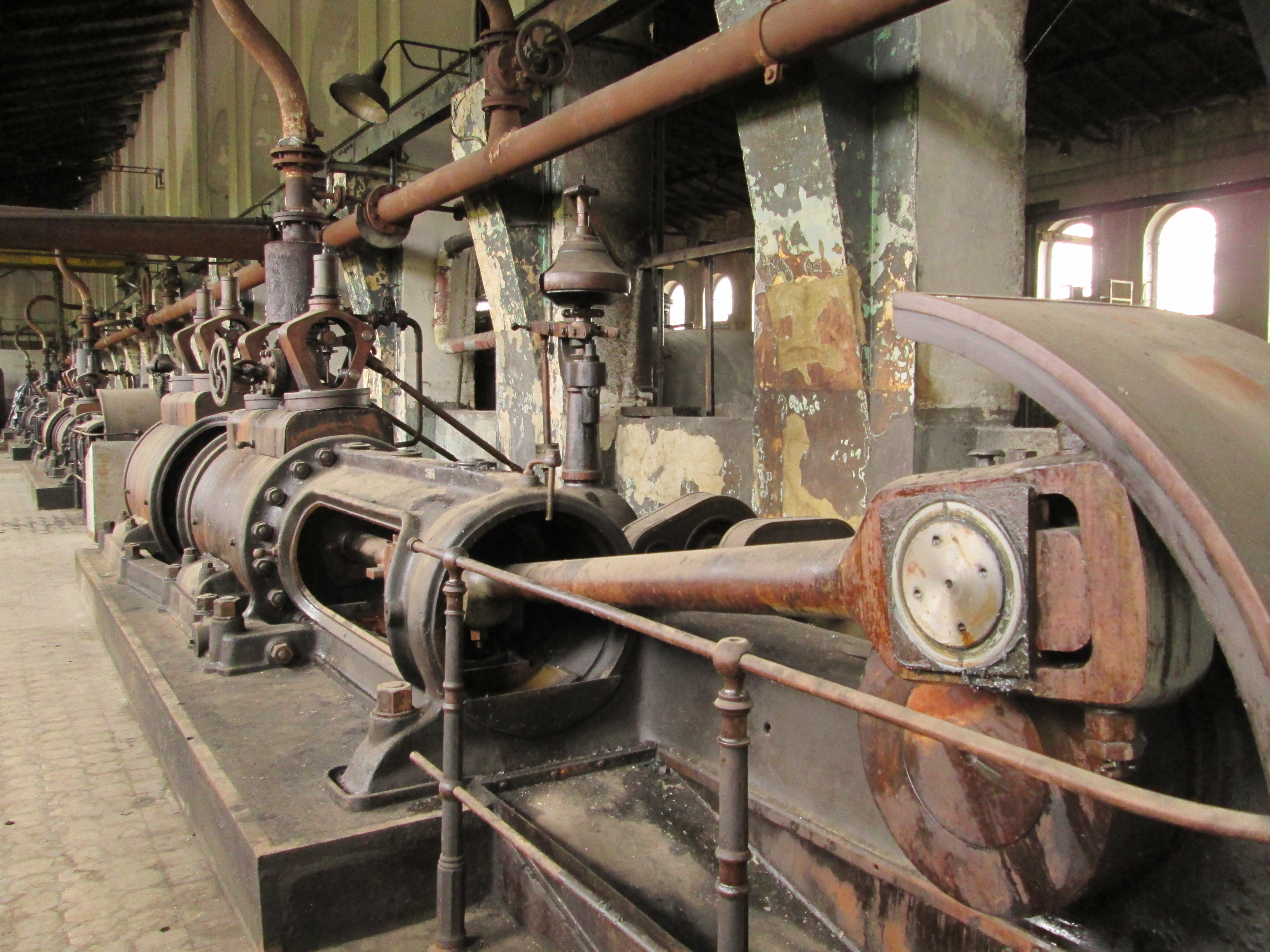 Katowice, walcownia, 1903-1904, 1915-1917